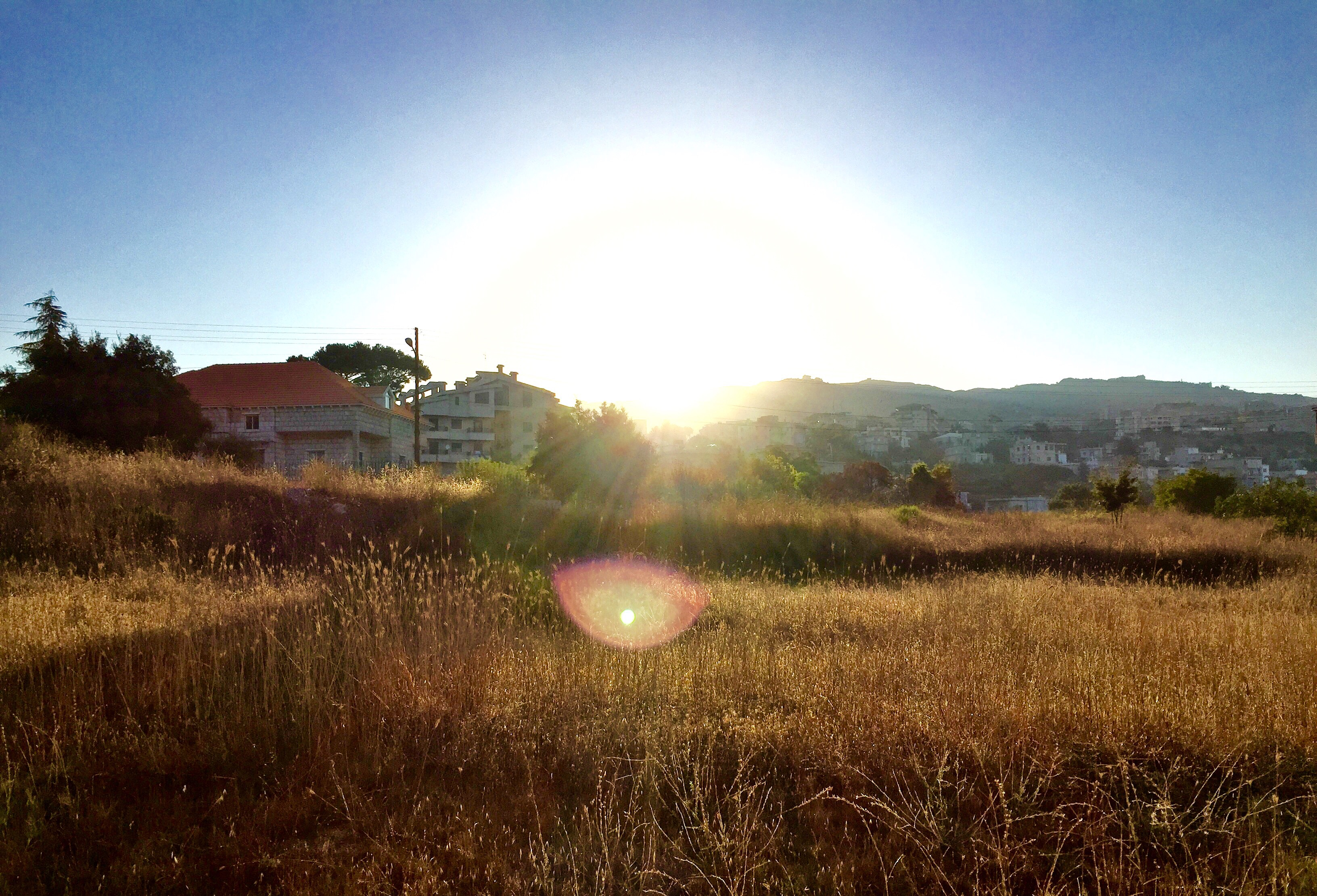 Sunshine at Mrouj